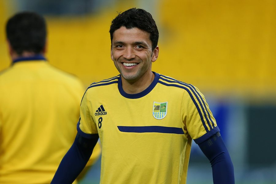 Едмар під час виступів за ФК Металіст